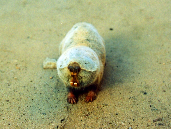 Цей вид є вузькеоареальним ендеміком Олешківських (Нижньодніпровських) пісків: він мешкає тільки на даній території, у Херсонській та Миколаївській областях, Ця особина (та, що на фото) спостерігалася у 2001 р. на Кінбурнському півосторві: там, де зараз знаходиться Національний рпиродний парк "Білобережжя Святослава".